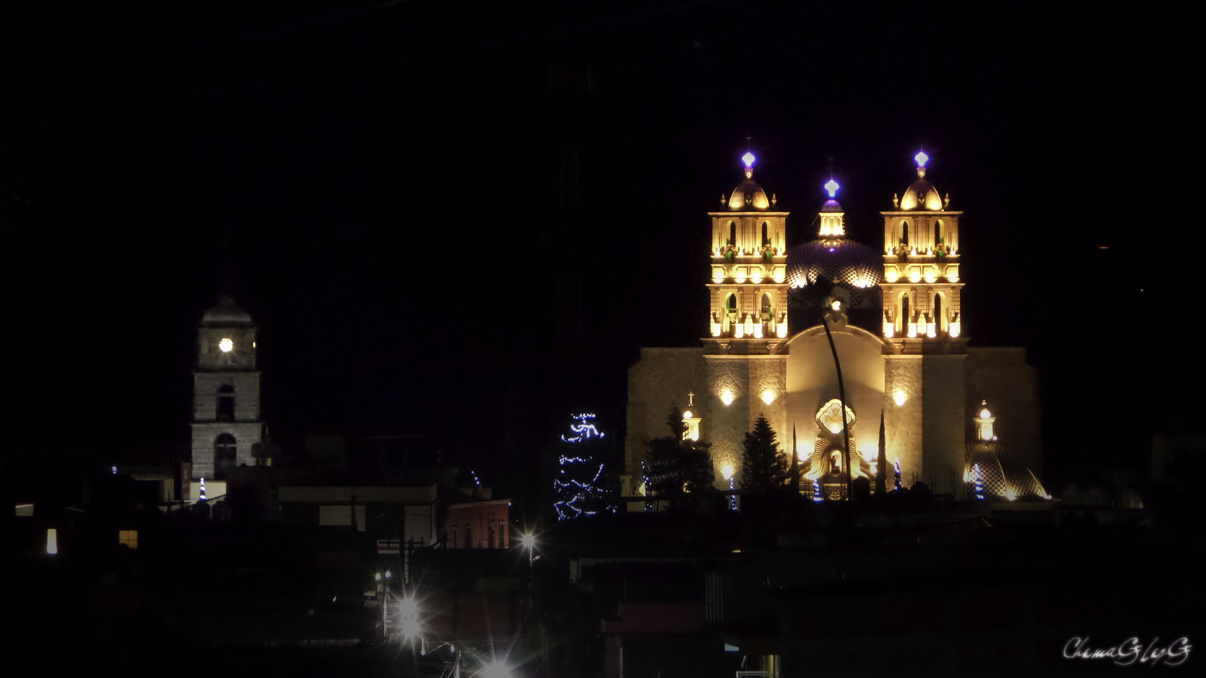 Parroquia de San Jerónimo a la Izquierda y Parroquia del Señor del Amparo a la Derecha